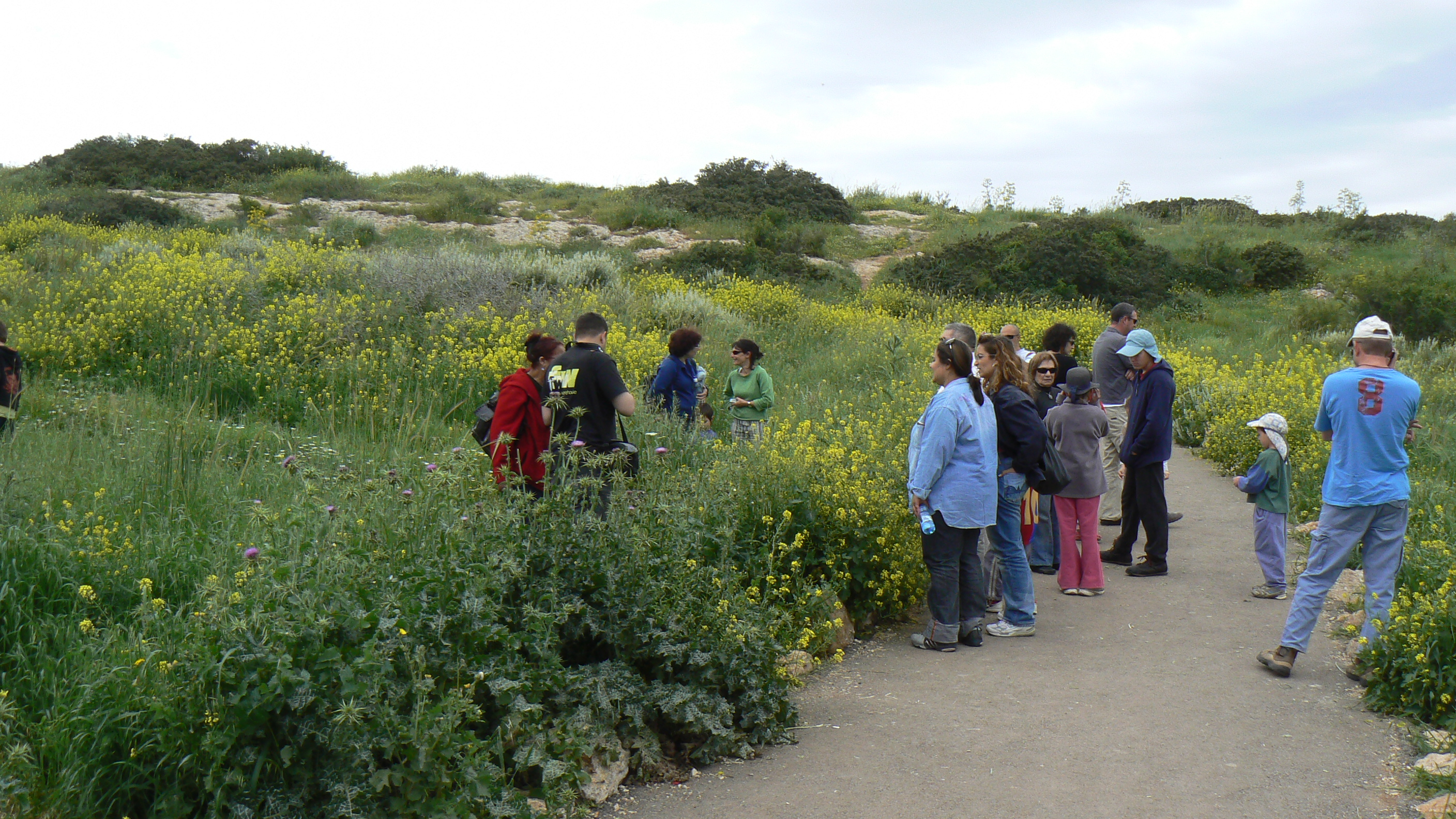 רק חצי עמישראל היו שם. בפסח הם יבואו שוב ויביאו איתם את החצי השני. Mount Gilboa